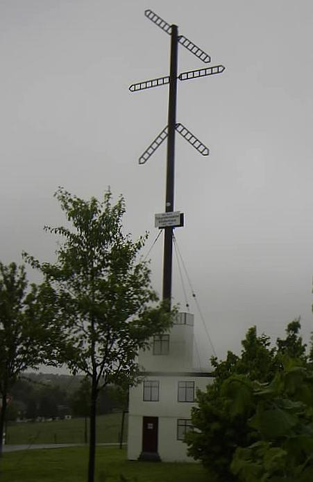 Nachbau einer optisch-mechanischen Telegrafenstation der preußischen Verbindung Berlin-Koblenz am Ortseingang von Straßenhaus an der B256